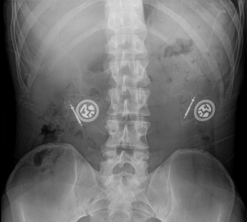 Zwerchfellschrittmacher bei Undine-Syndrom